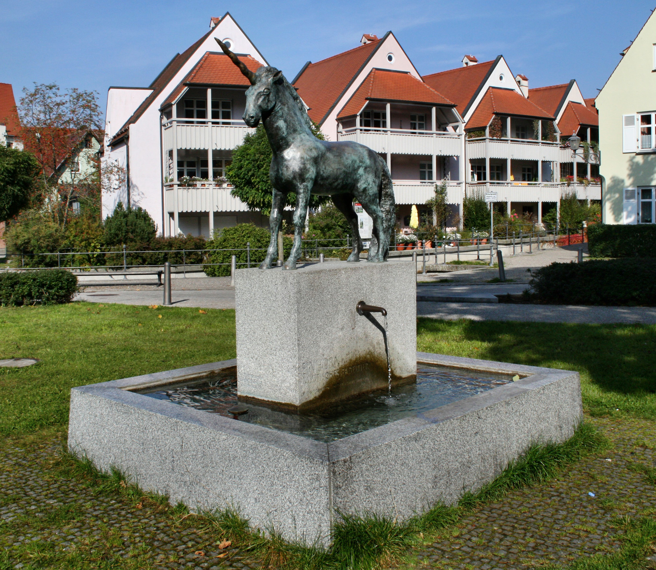 Der Einhorn-Brunnen im Park vor der Kirche